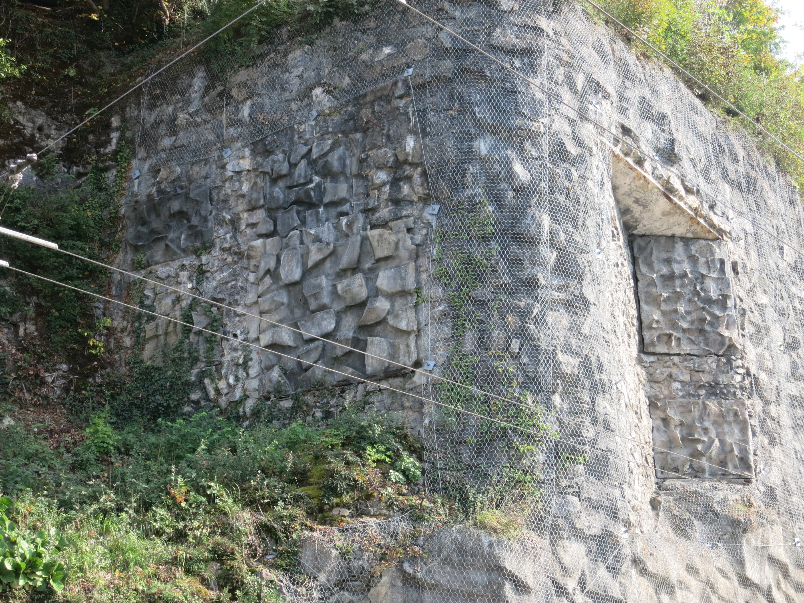 Sperrstelle Chillon VD, Schweiz